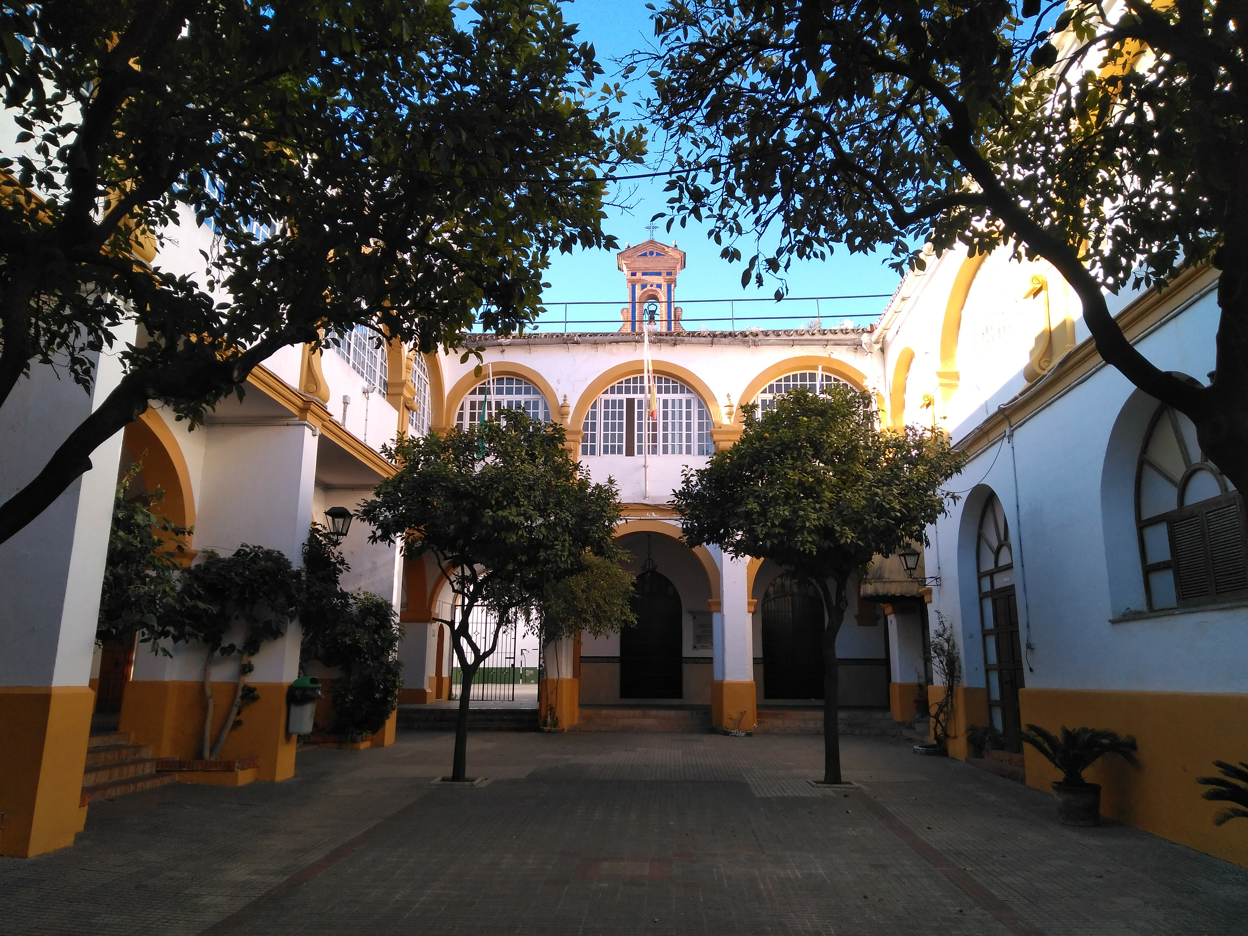 exterior de la capilla del colegio La Salle - San José de Jerez